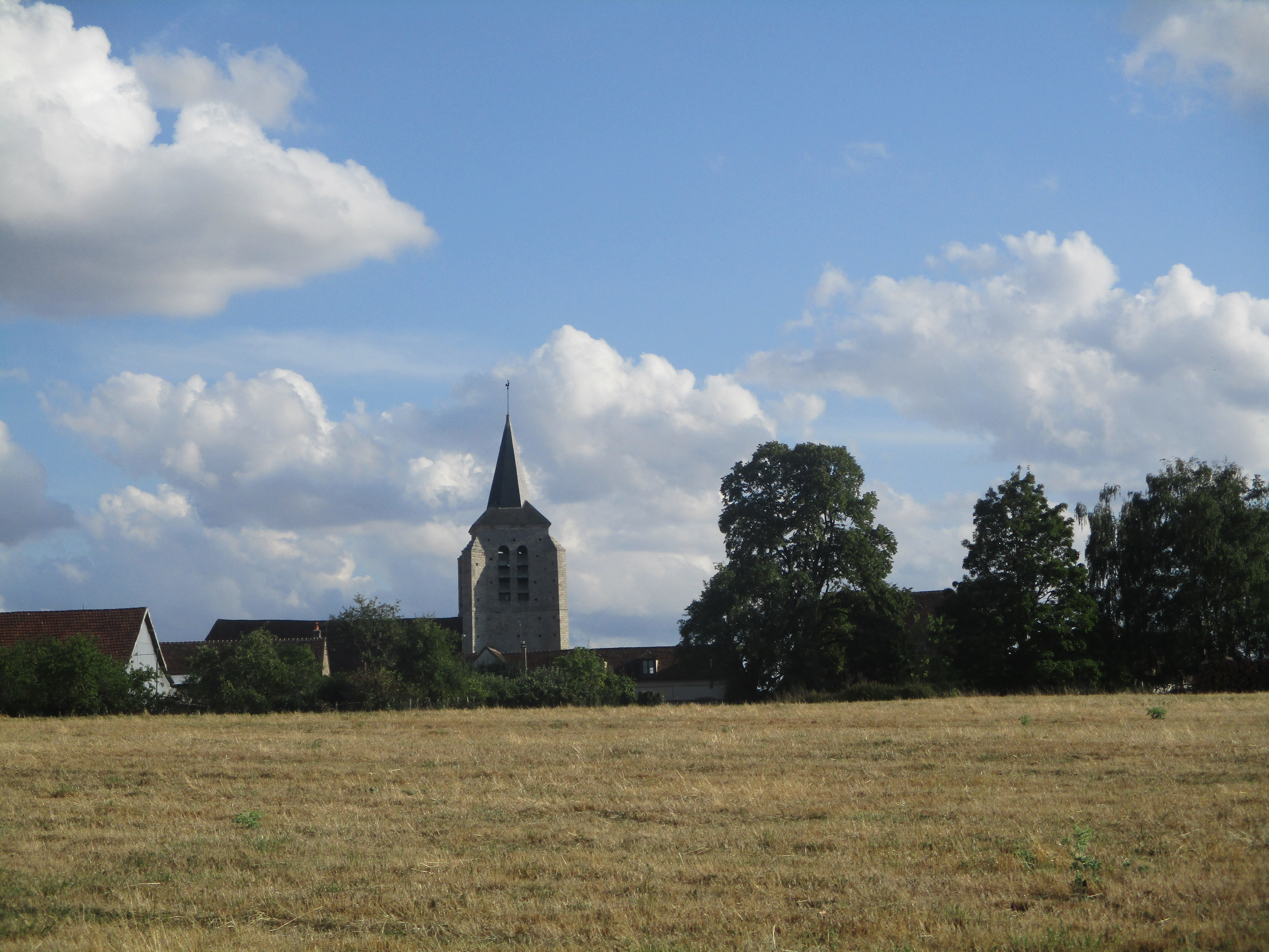 Vue de Chaumot.